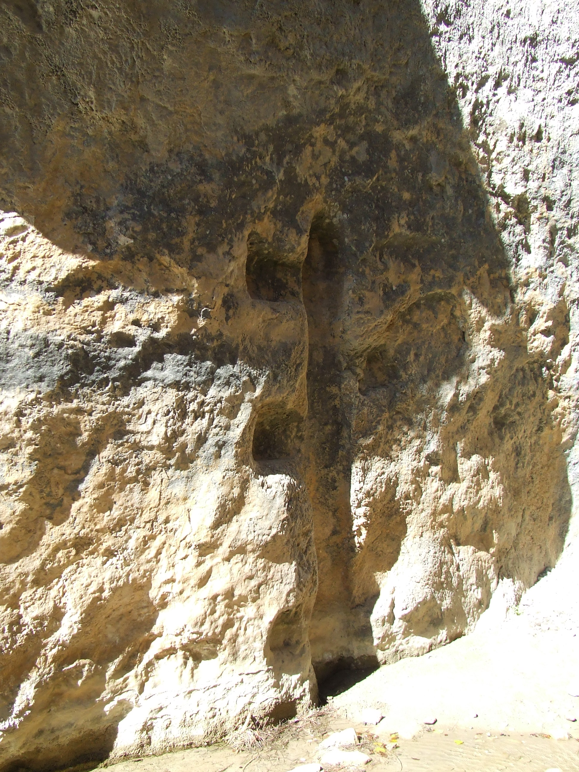 El Foradot, o Forat d'Abella (Abella de la Conca, Pallars Jussà)